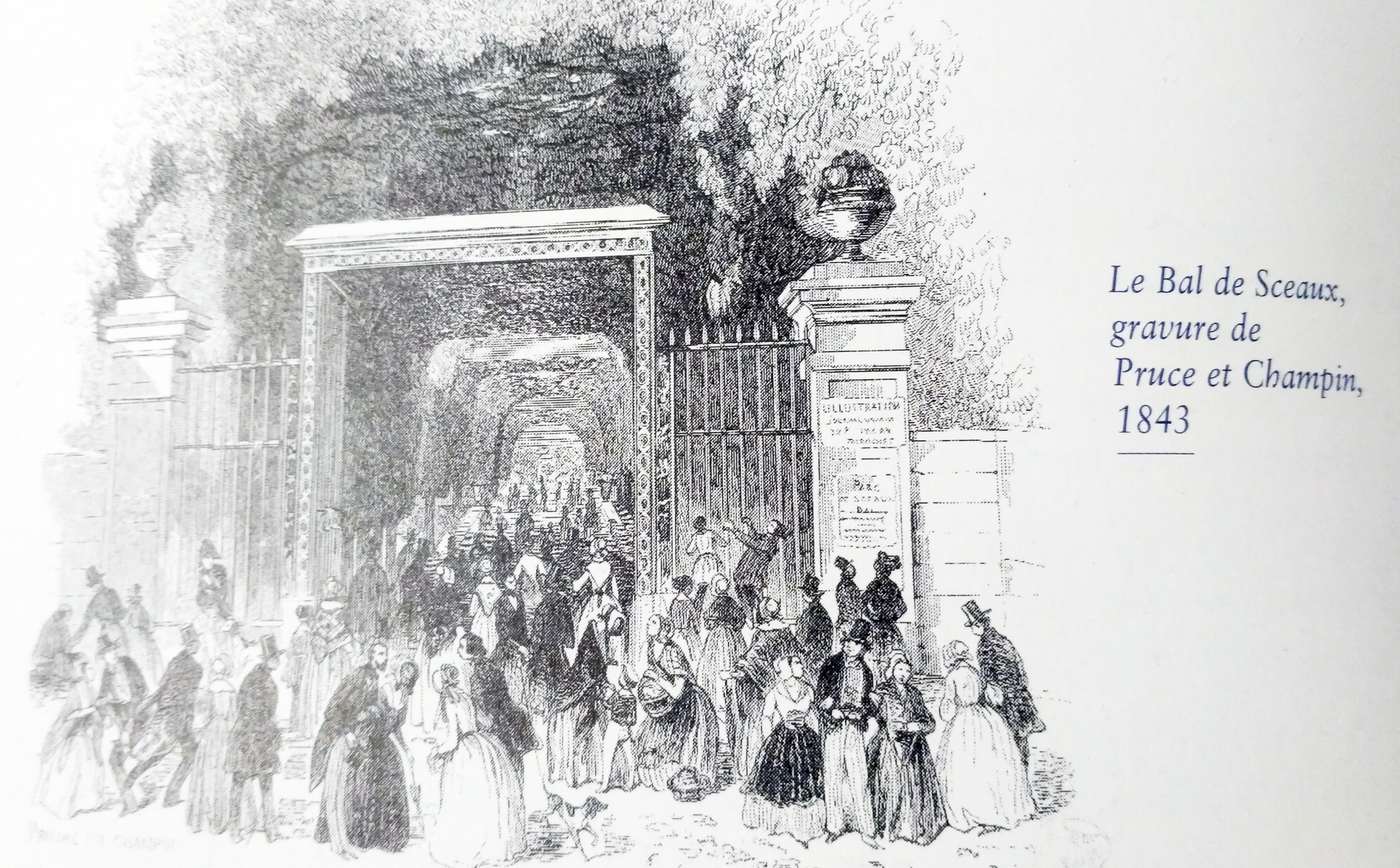 Gravure de Pruce et Champin, entrée du jardin de la ménagerie un jour de bal, 1843